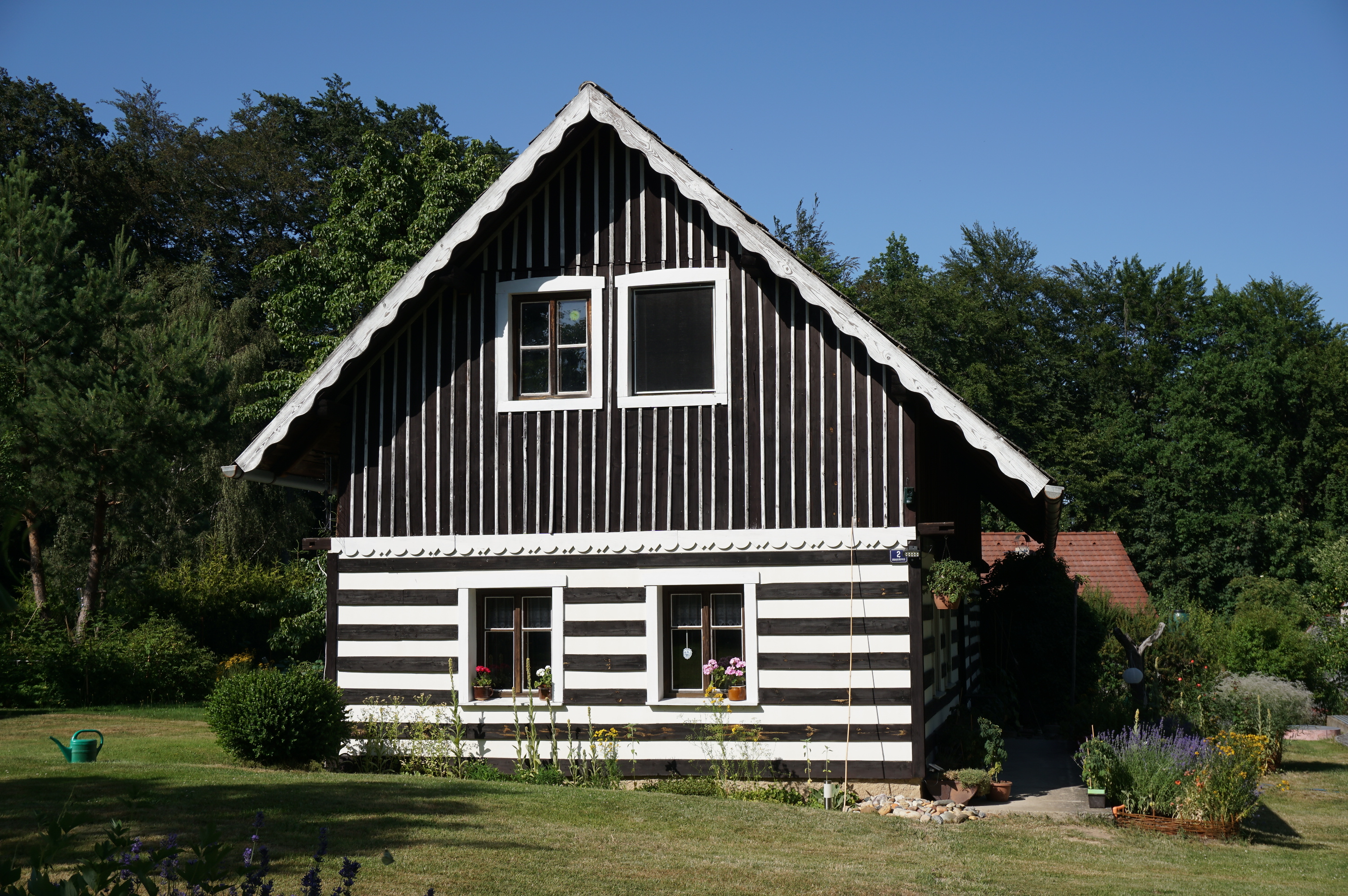 Drahoňovice (u Vyskře) - čp. 2